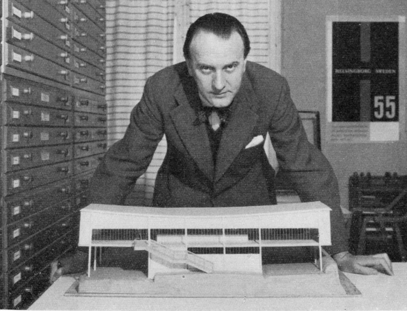 Arkitekt Carl-Axel Acking med modellen för utställningspaviljongen för H55